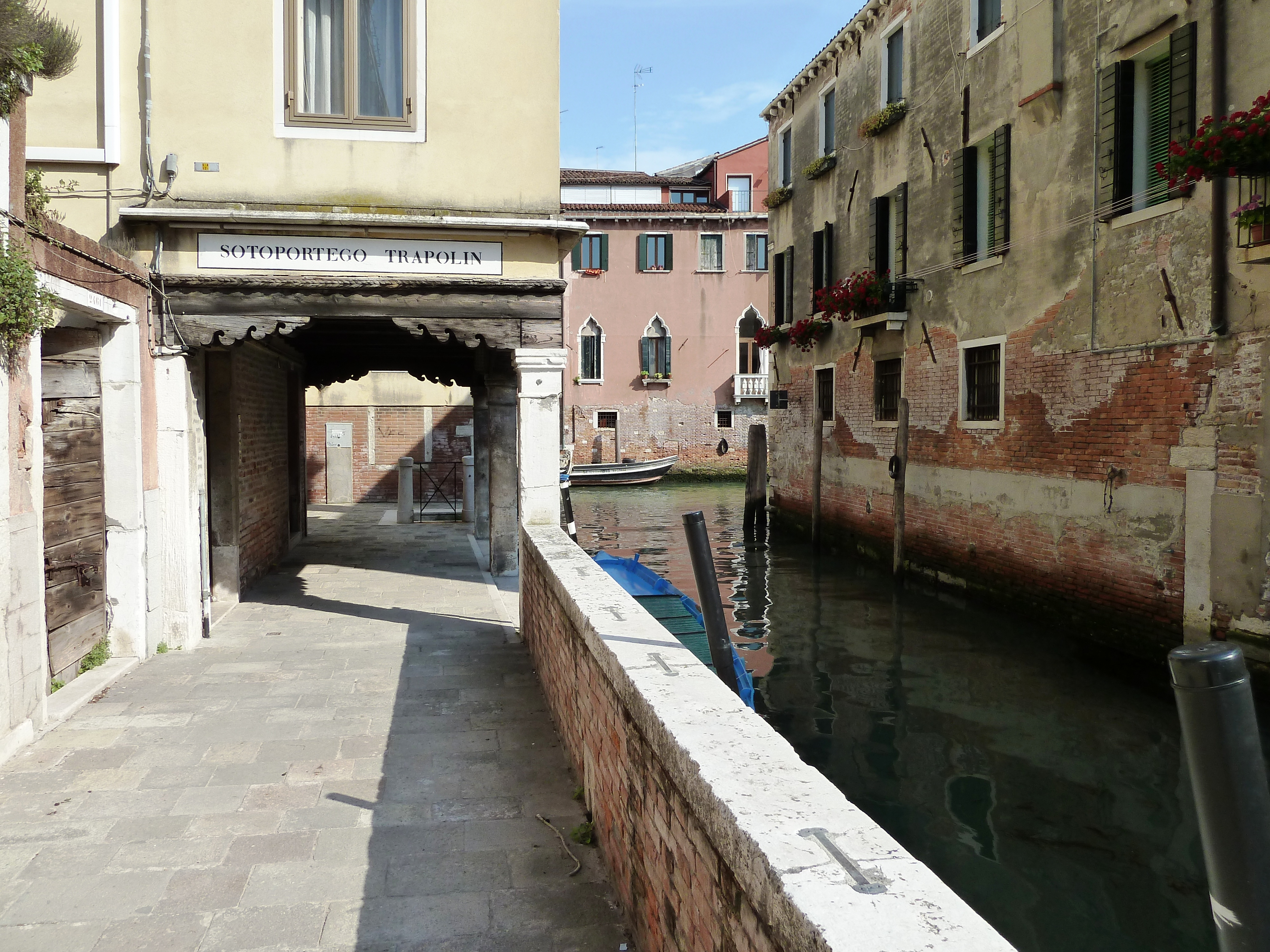 Sotoportego Trapolin (Venice)